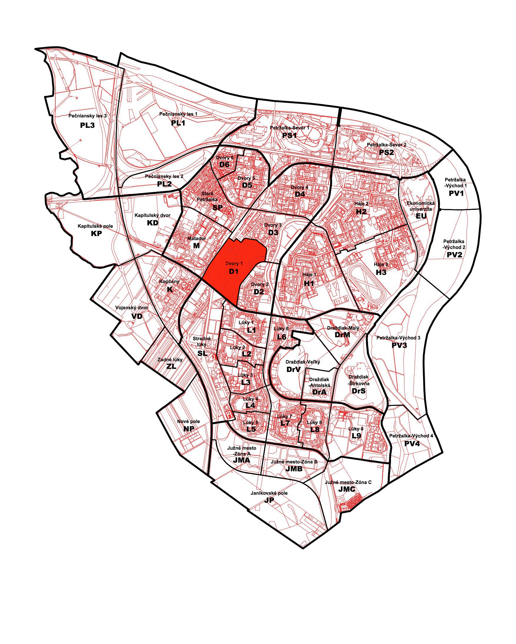 Poloha petržalskej miestnej časti